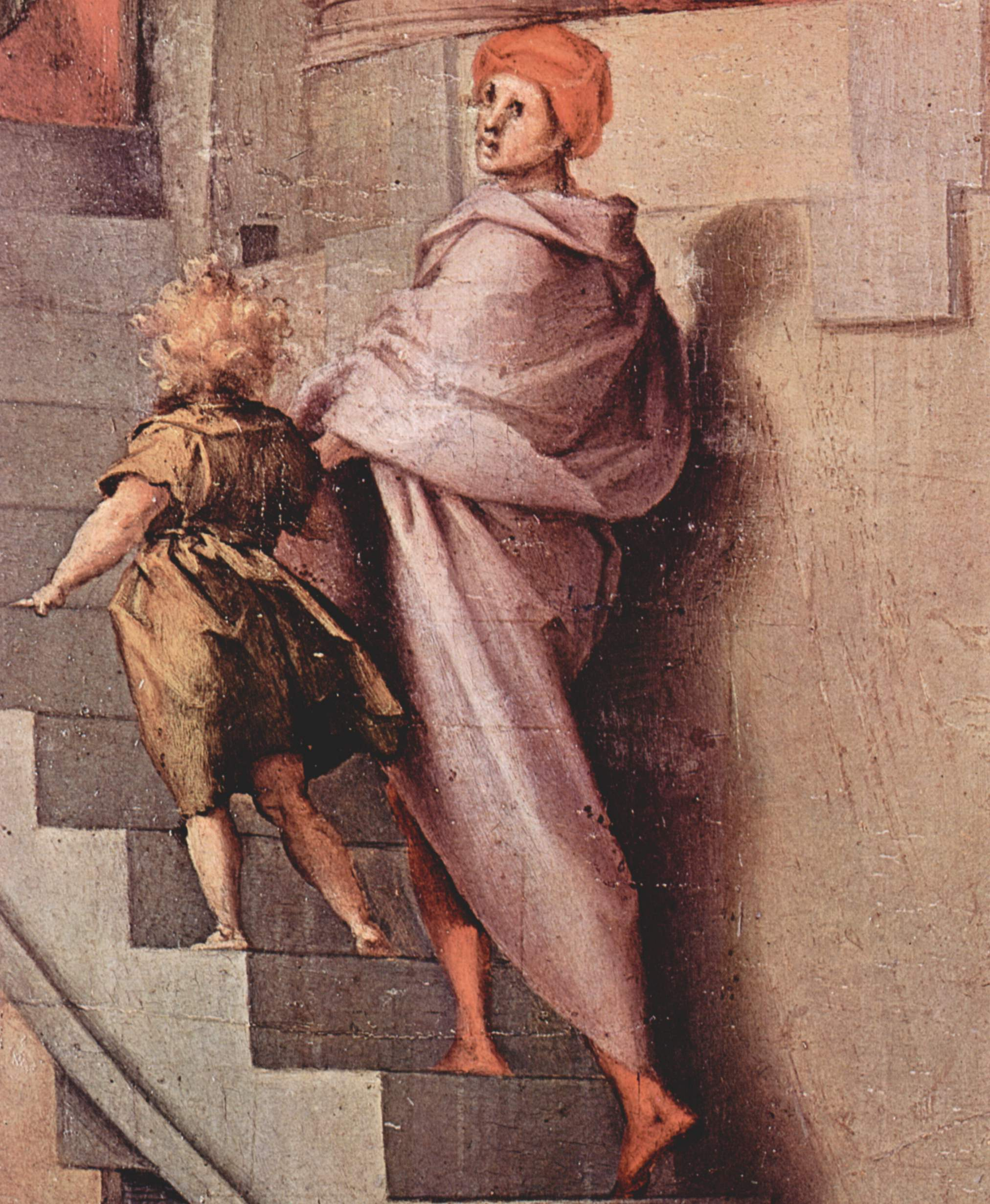 Gemälde für das Hochzeitszimmer des Pier Francesco Borgherini im Familienpalast in Florenz, Szene: Joseph in Ägyptendetail